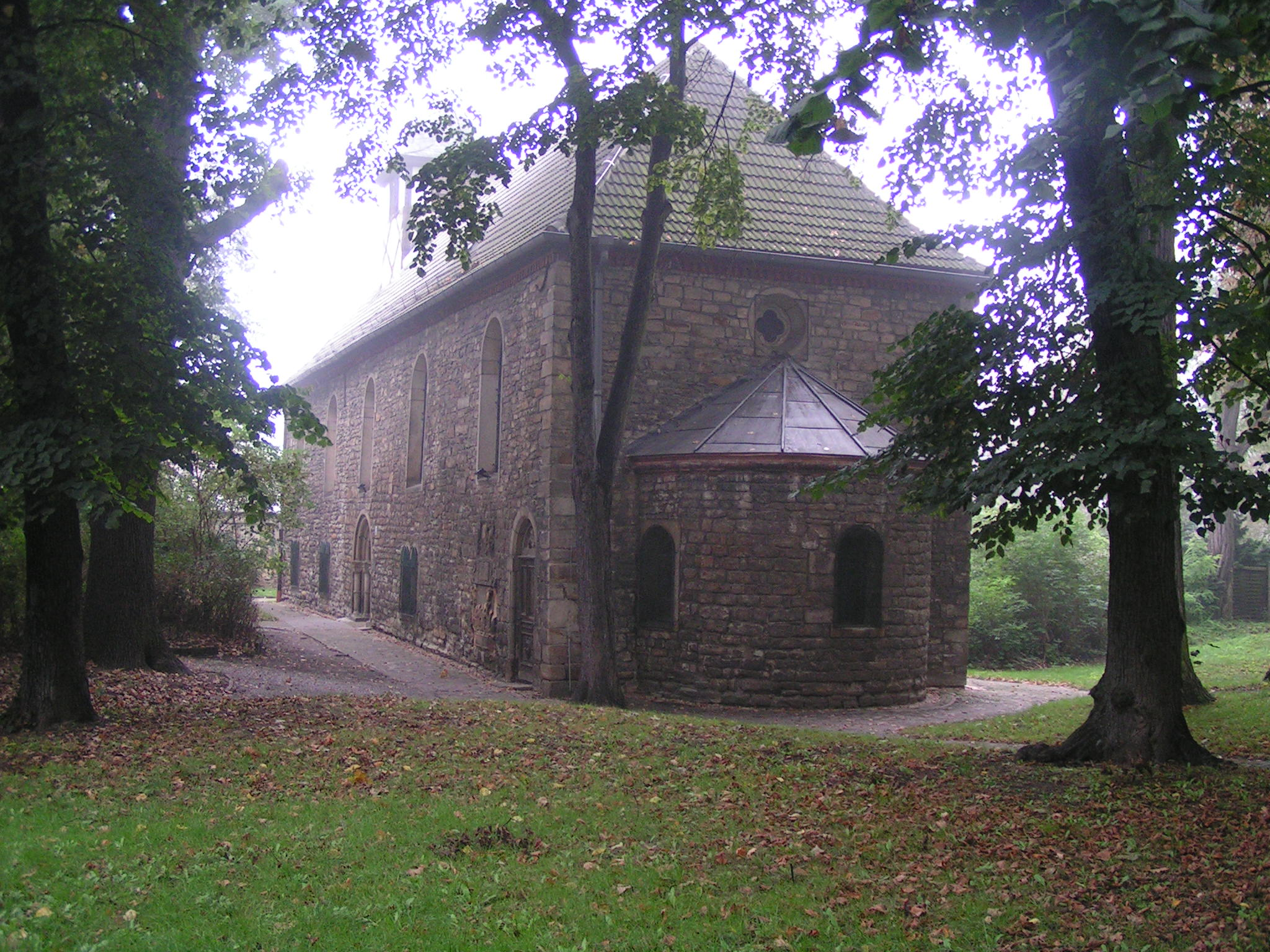 Lorenzkirche Calbe. Selbst fotografiert am 3. Dezember 2005.